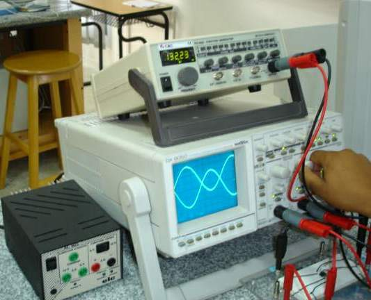 Oscilloscope